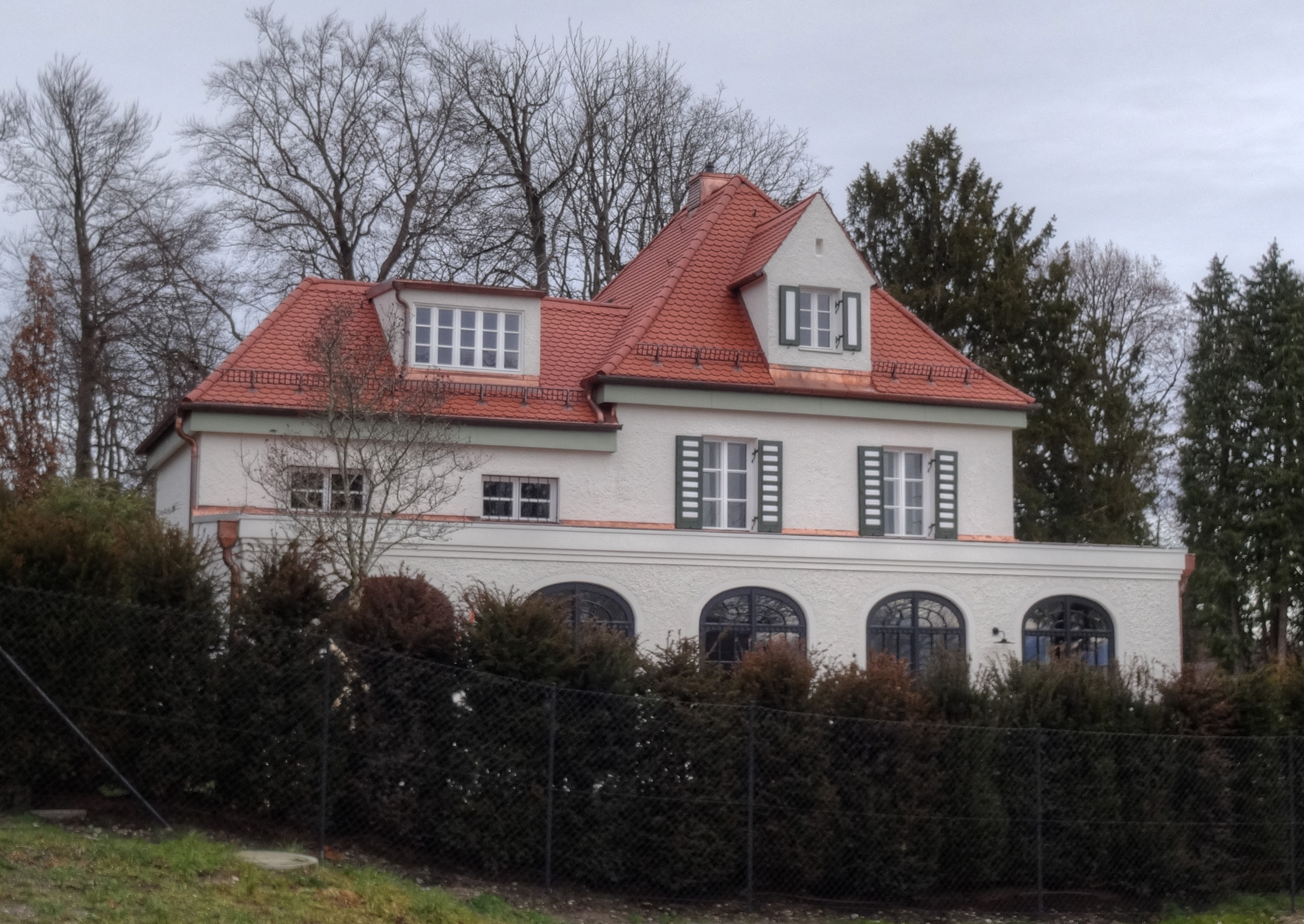 Villa Maffei,Feldafing 2019. Gärtner-, Gewächs- und Garagenhaus This is a photograph of an architectural monument.